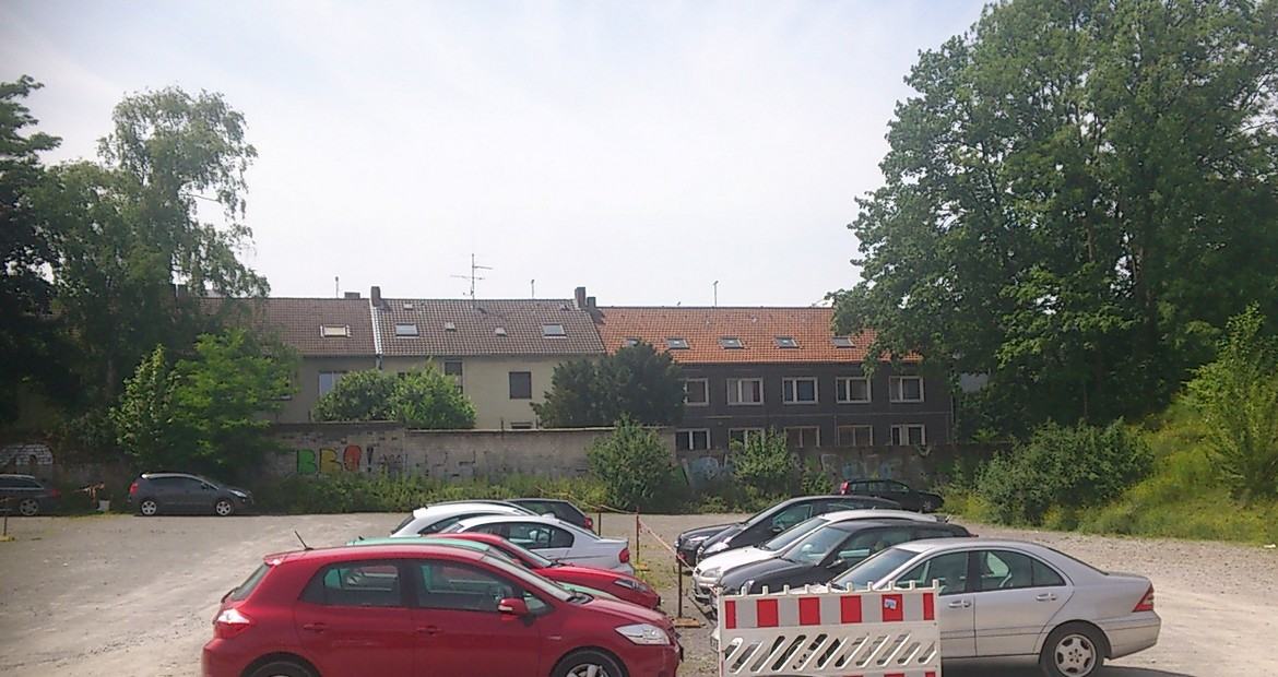 Blick auf die Stahlstraße Essen vom Parkplatz Segerothstraße (Blickrichtung nach Westen)